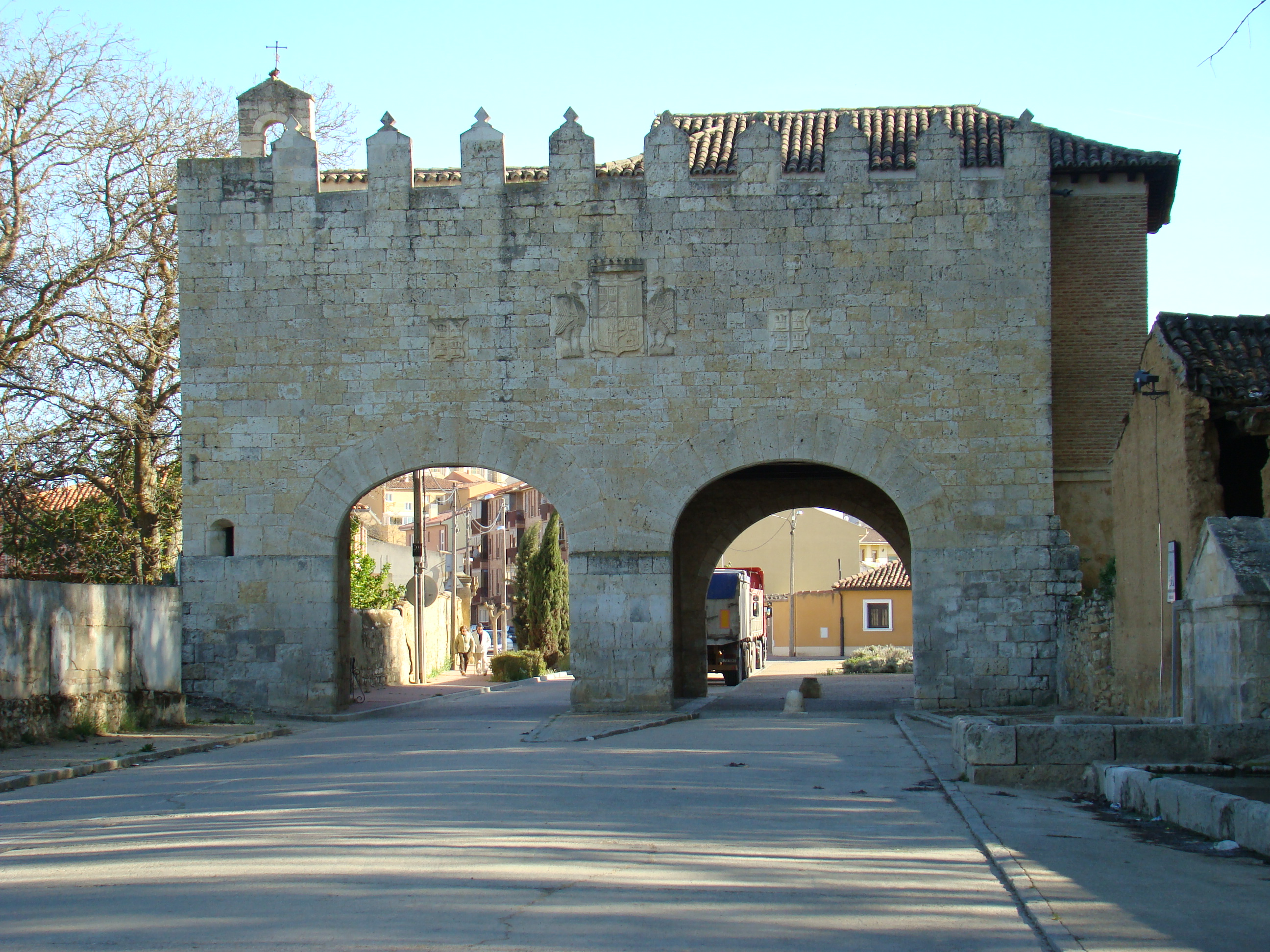 Medina de Rioseco en la provincia de Valladolid, España. Puerta de San Sebastián, siglo XVI.